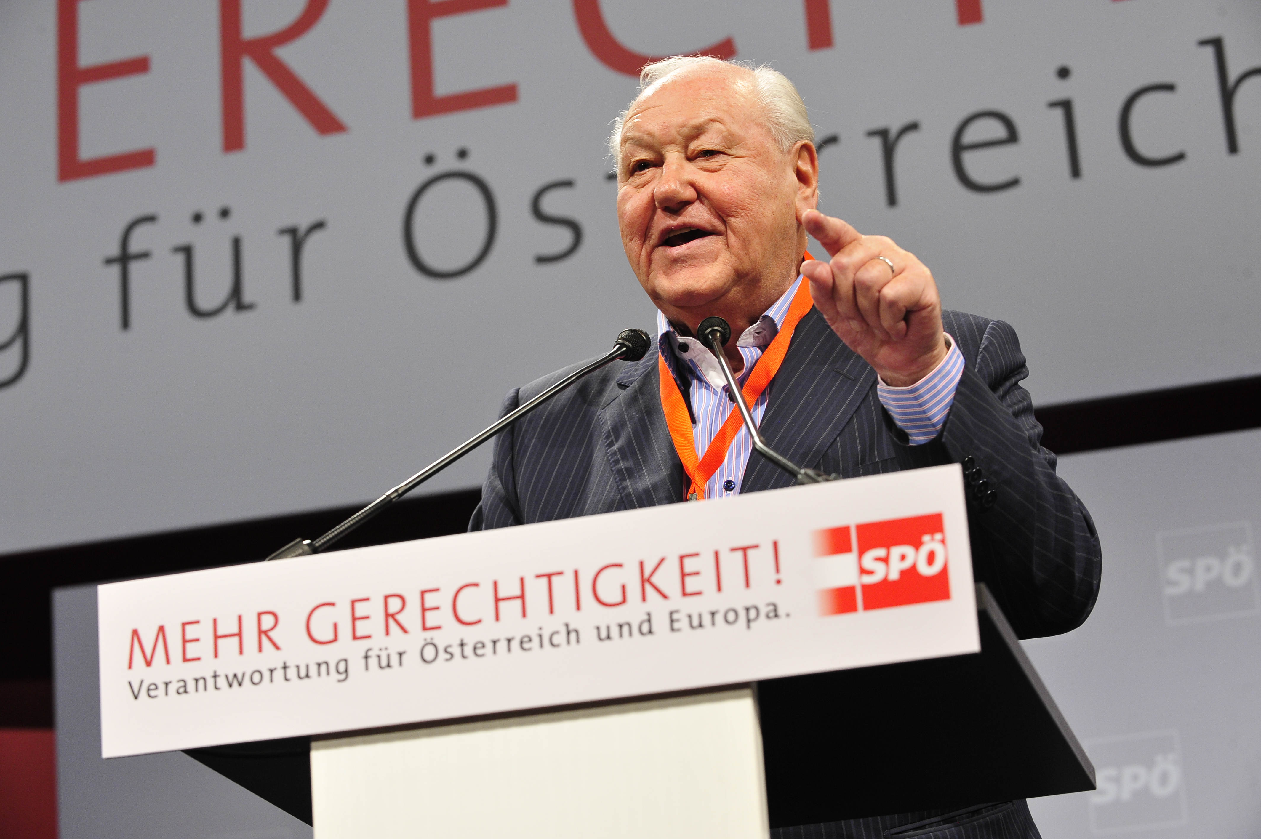 Karl Blecha am SPÖ-Bundesparteitag 2012. 13.10.2012 - VAZ St.Pölten